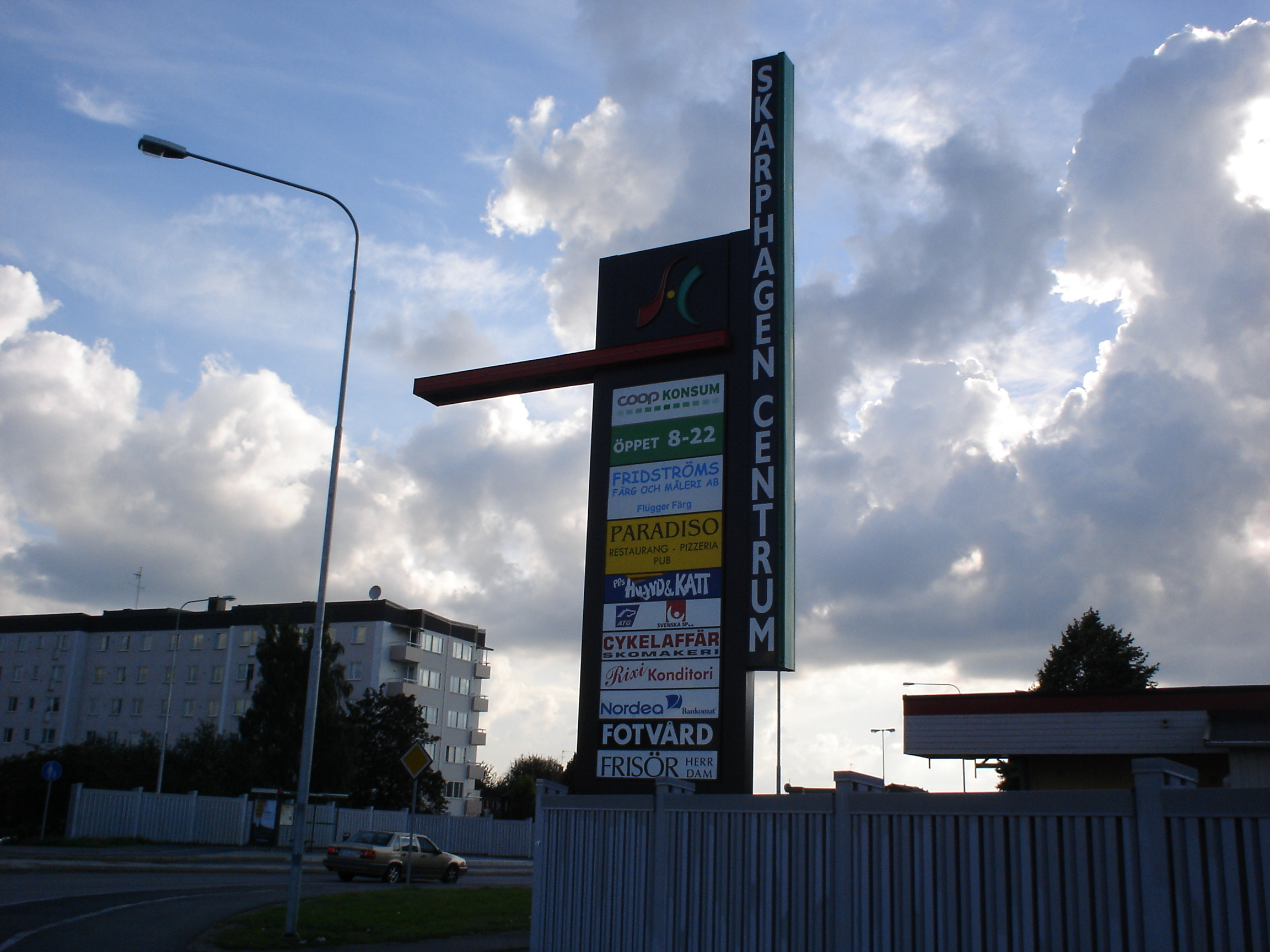 Affärerna i Skarphagens centrum, Norrköping